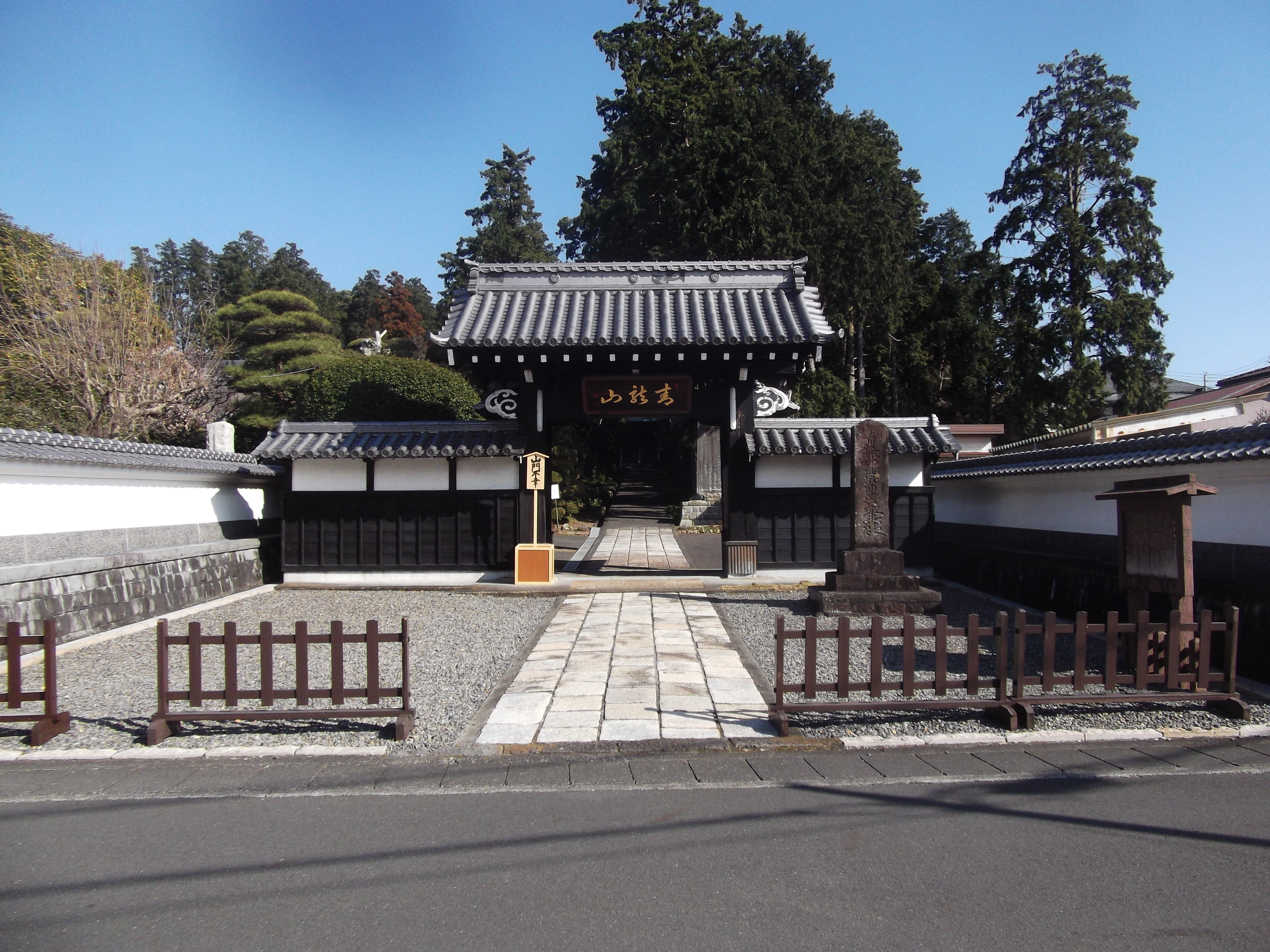 静岡市駿河区の本覚寺